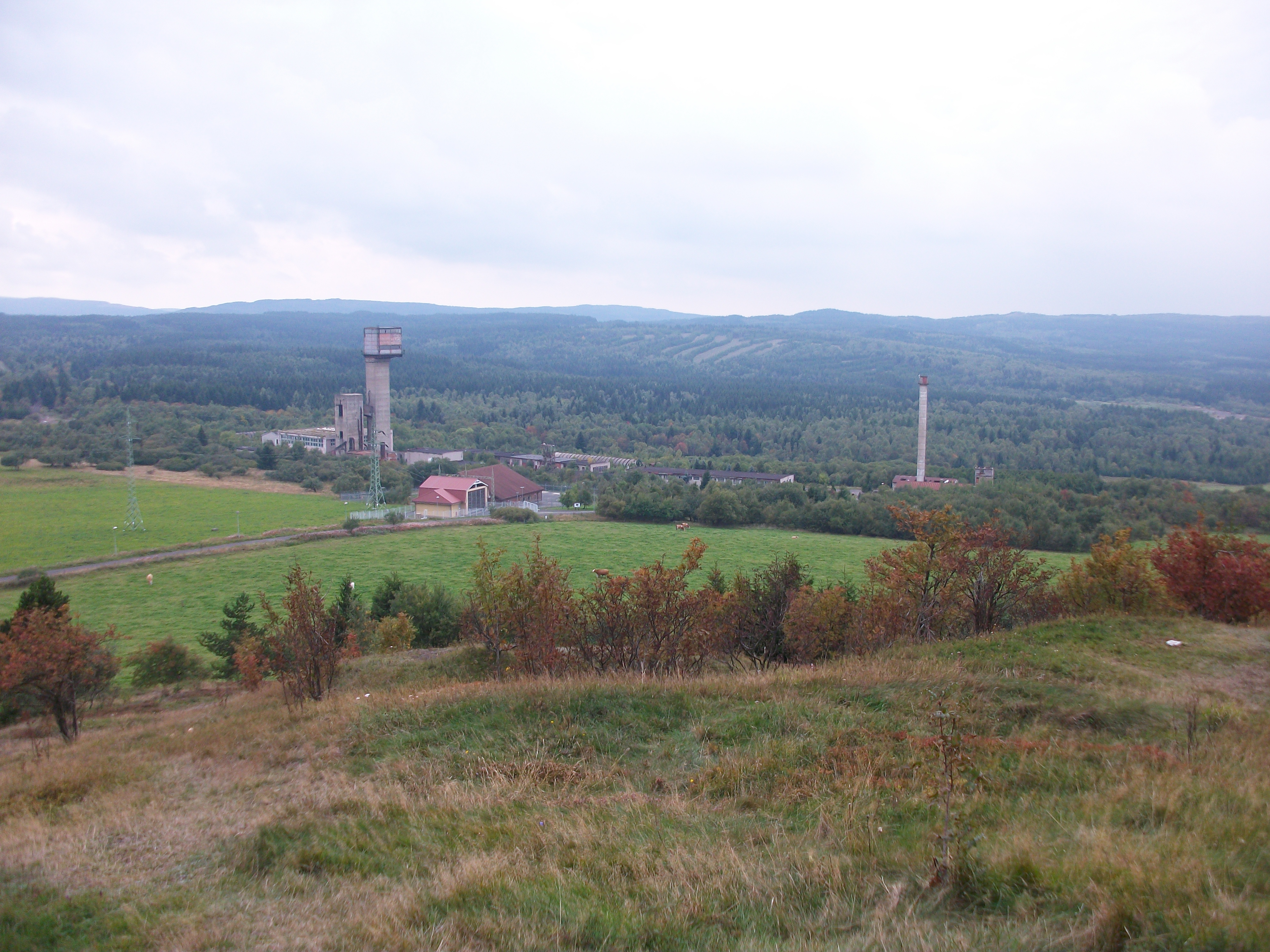 Stillgeegtes Bergwerk in Měděnec (Kupferberg)